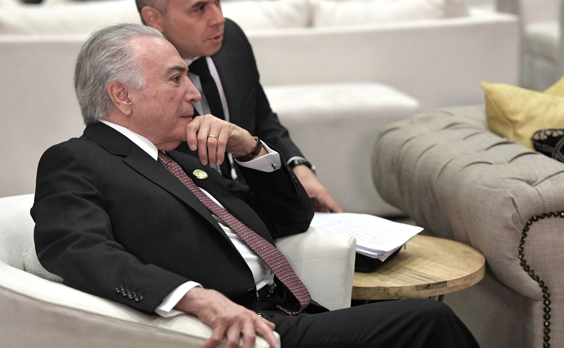 Президент Бразилии Мишел Темер перед началом саммита БРИКС.